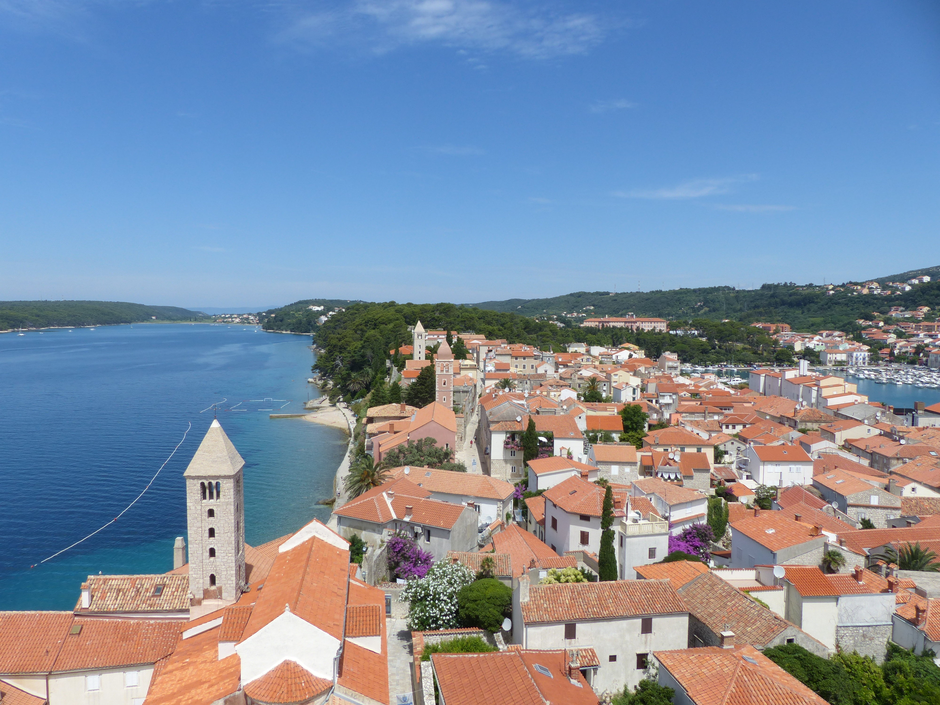 A felvétel 2016. június 30-án készült Rab városában. Rab sziget, Horvátország. Kilátás a Harangtoronyból a városra és környékére.